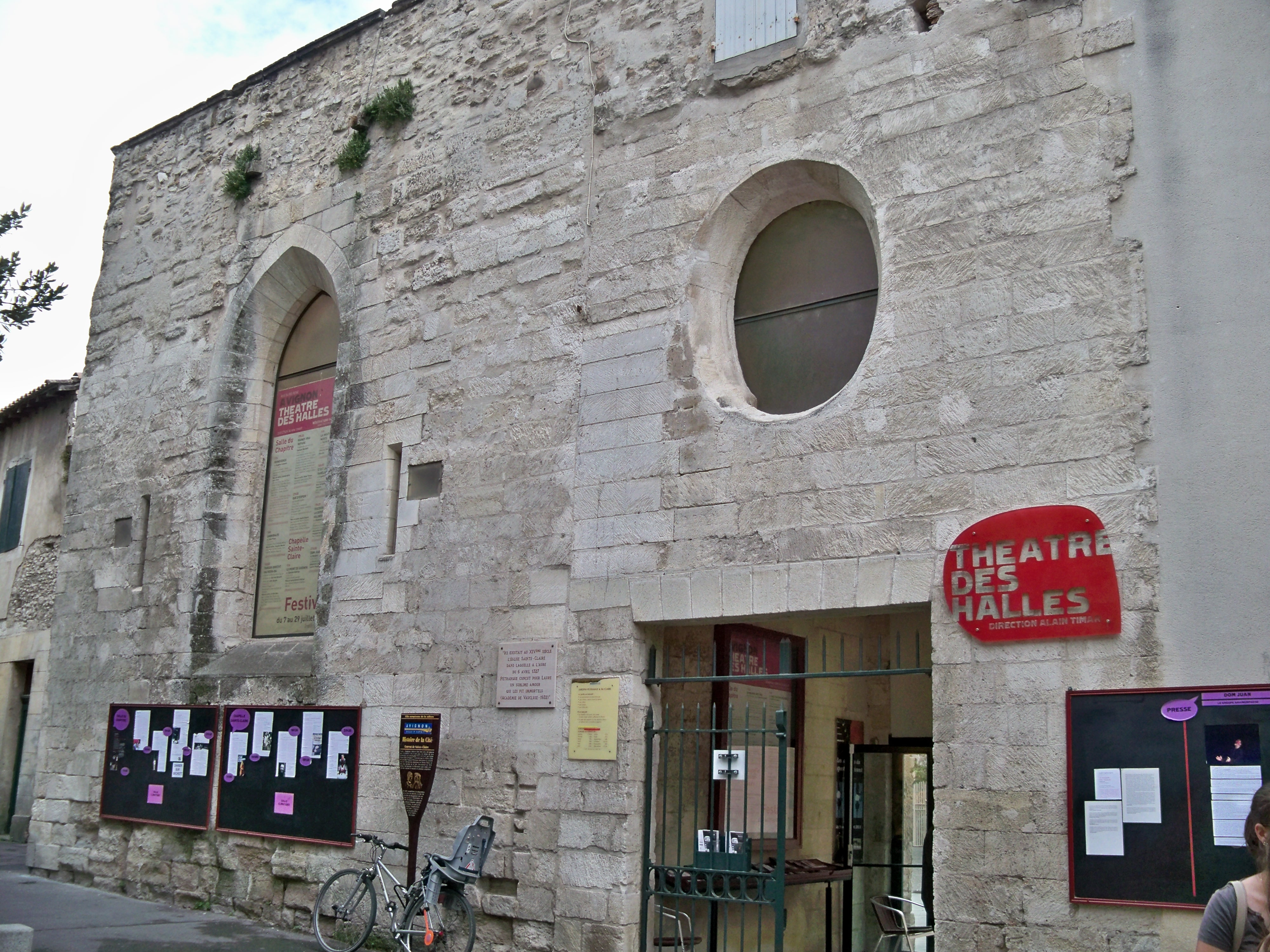 Facade Sainte Claire